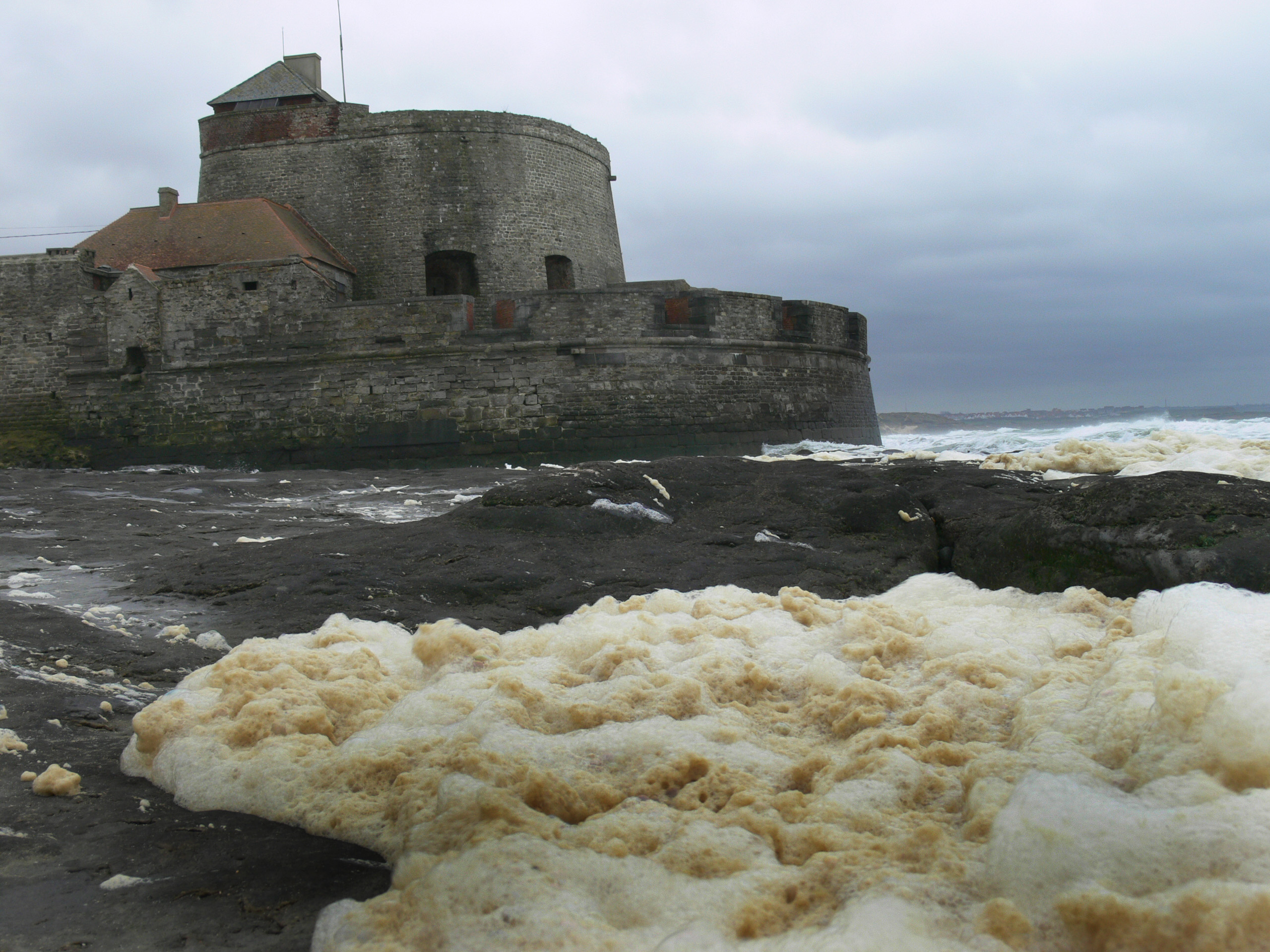 Fort mahon, à Ambleteuse sur le littoral du Pas-deCalais, en Région Nord-Pas-de-Calais. On distingue au premier plan une écume qui est un bloom algual (efflorescence) de Phaeocystis Unknown